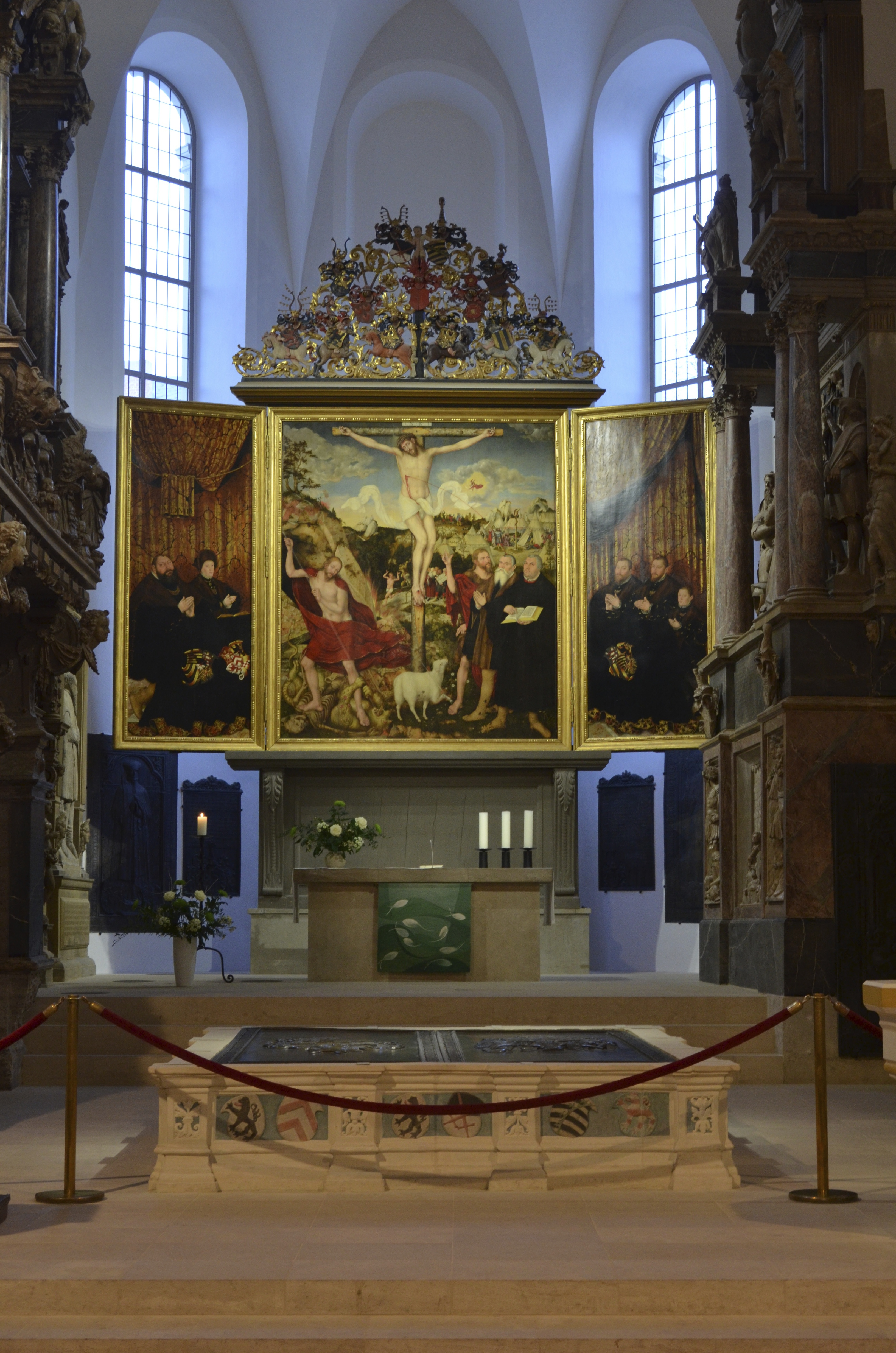 Category:Altar in St. Peter und Paul, Weimar by Cranachs|Altarpiece in St. Peter and Paul, Weimar , sv=Cranachs altartavla i Herderkirche, Weimar.